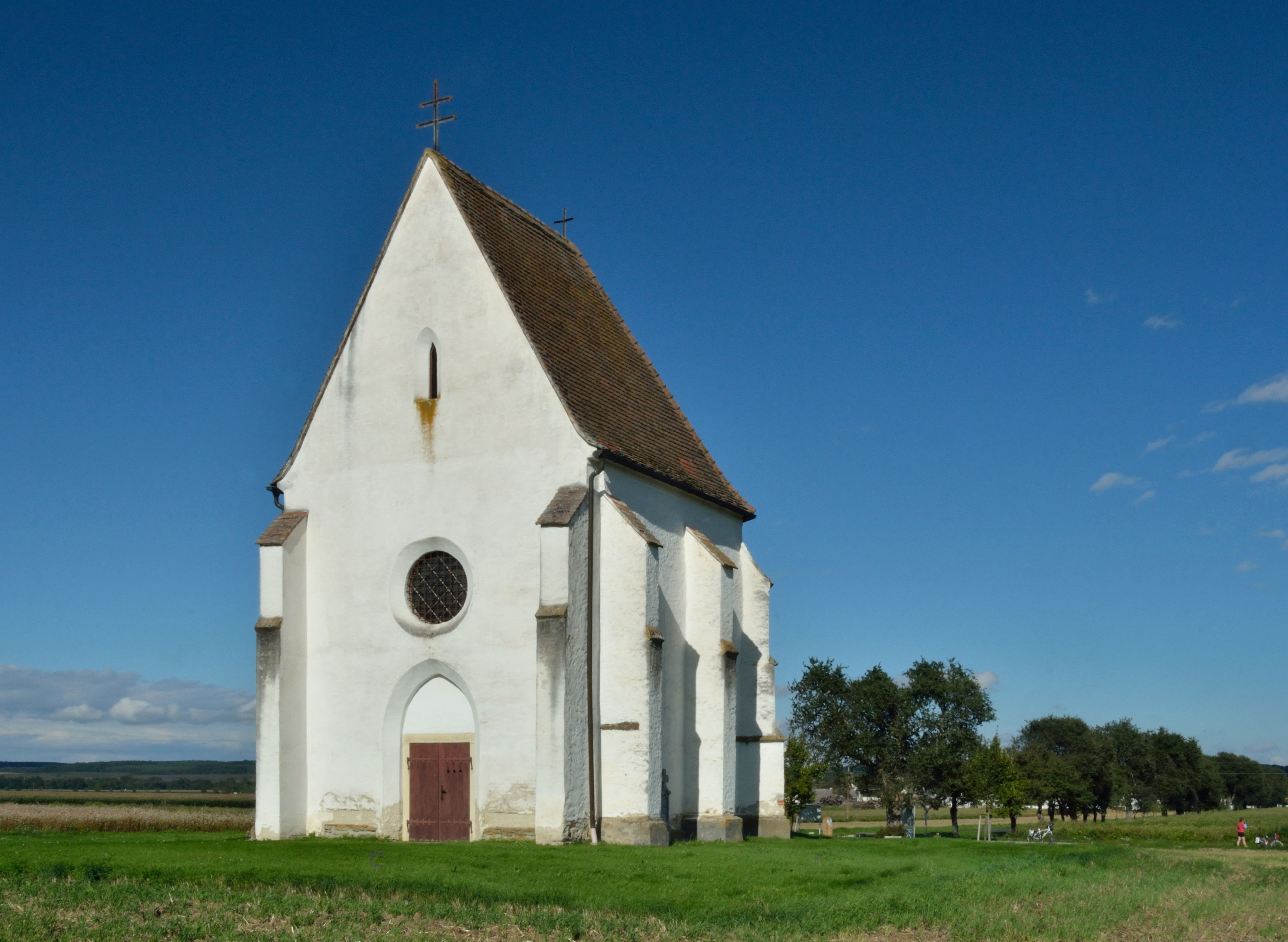 Martinskirche Deutsch Schützen, Westseite.